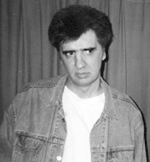 Slika književnika Zorana Đurovića